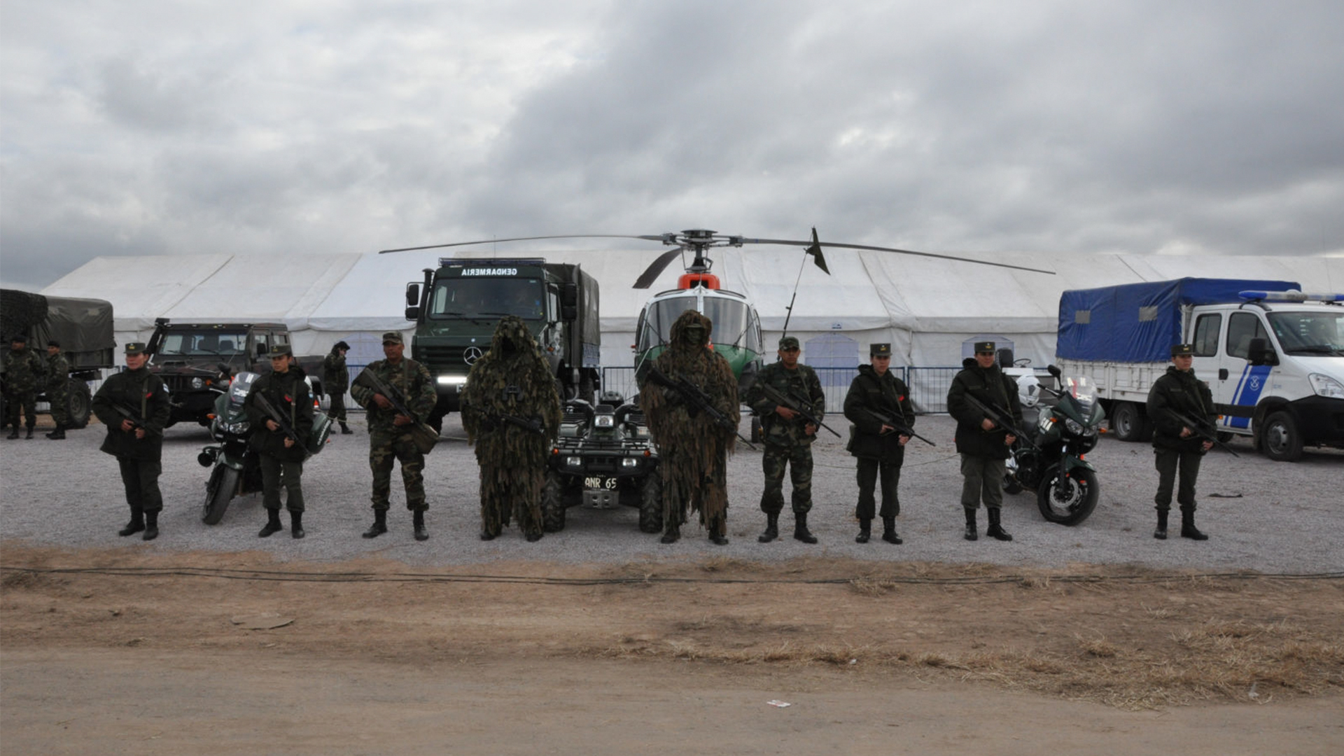 El Gobierno prorrogó hasta el 31 de diciembre de 2016 el Operativo Escudo Norte, que apunta a incrementar la vigilancia y el control de las fronteras noreste y noroeste del país para combatir el tráfico ilícito de drogas, la trata de personas y el contrabando. El Operativo Escudo Norte es el plan de vigilancia y control del espacio terrestre, fluvial y aéreo del país que fue creado por decreto en julio de 2011 y desde entonces fue extendido. Su objetivo es “incrementar la vigilancia y el control del espacio terrestre, fluvial y aéreo de jurisdicción nacional en las fronteras noreste y noroeste de la República Argentina, así como la aprehensión y la puesta a disposición de las autoridades judiciales de quienes crucen las fronteras de manera ilegal”.